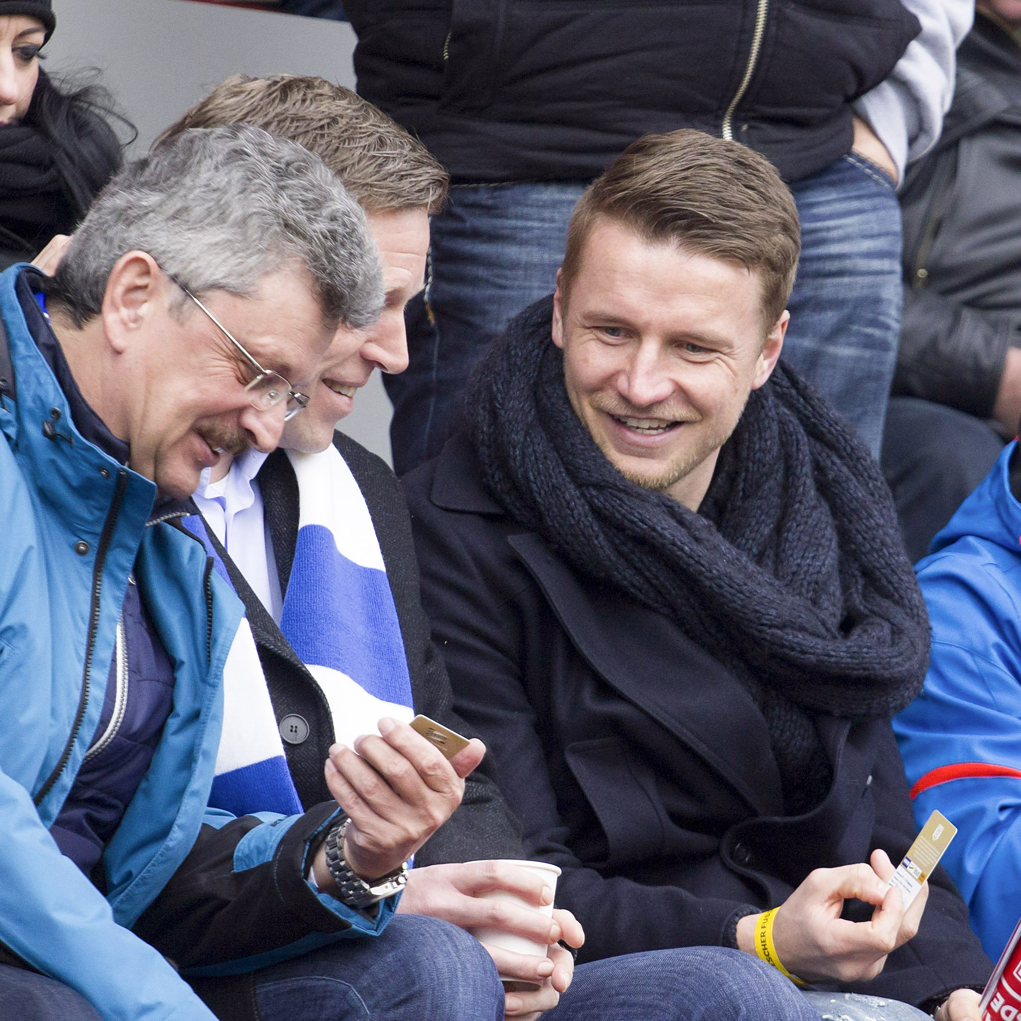 Maik Franz 2016